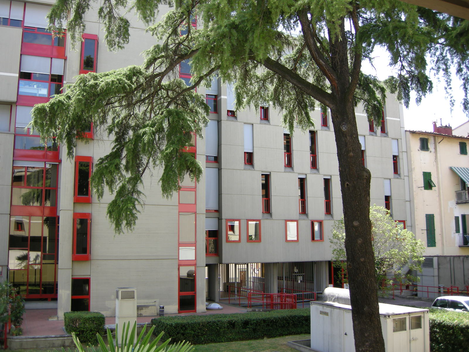 Ex sede della nuova italia